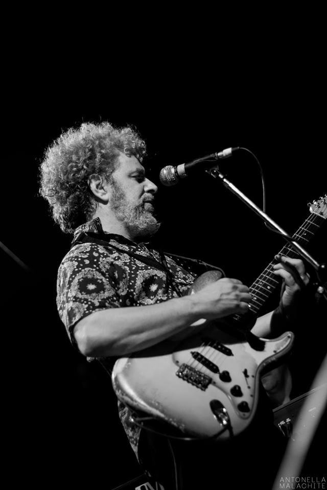 Sergio Rotman junto a una de sus bandas "Mimi Maura"